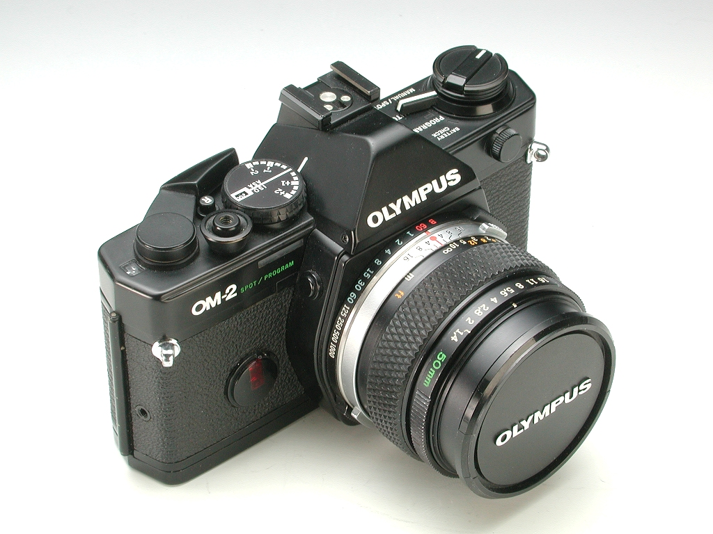 Olympus OM-2 Spot/Program